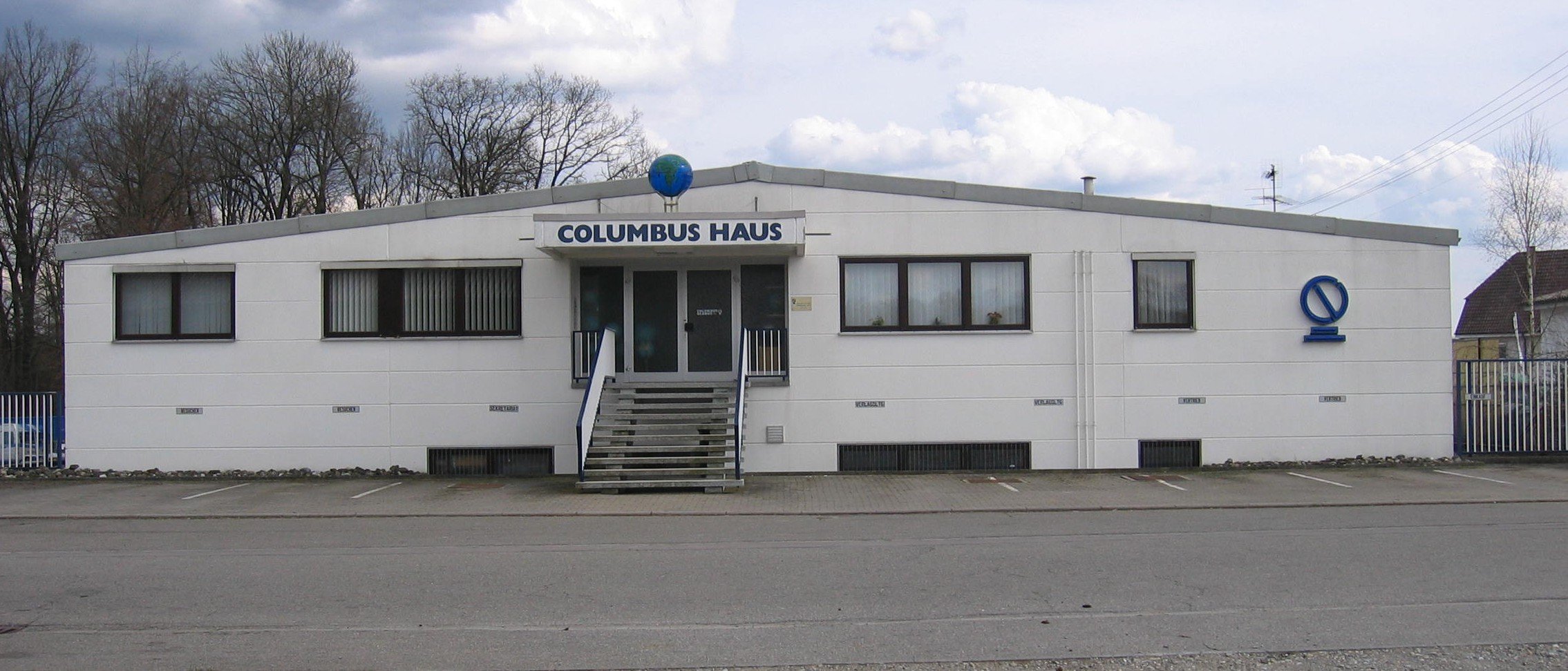 Unternehmensitz des Columbus Verlags in Krauchenwies